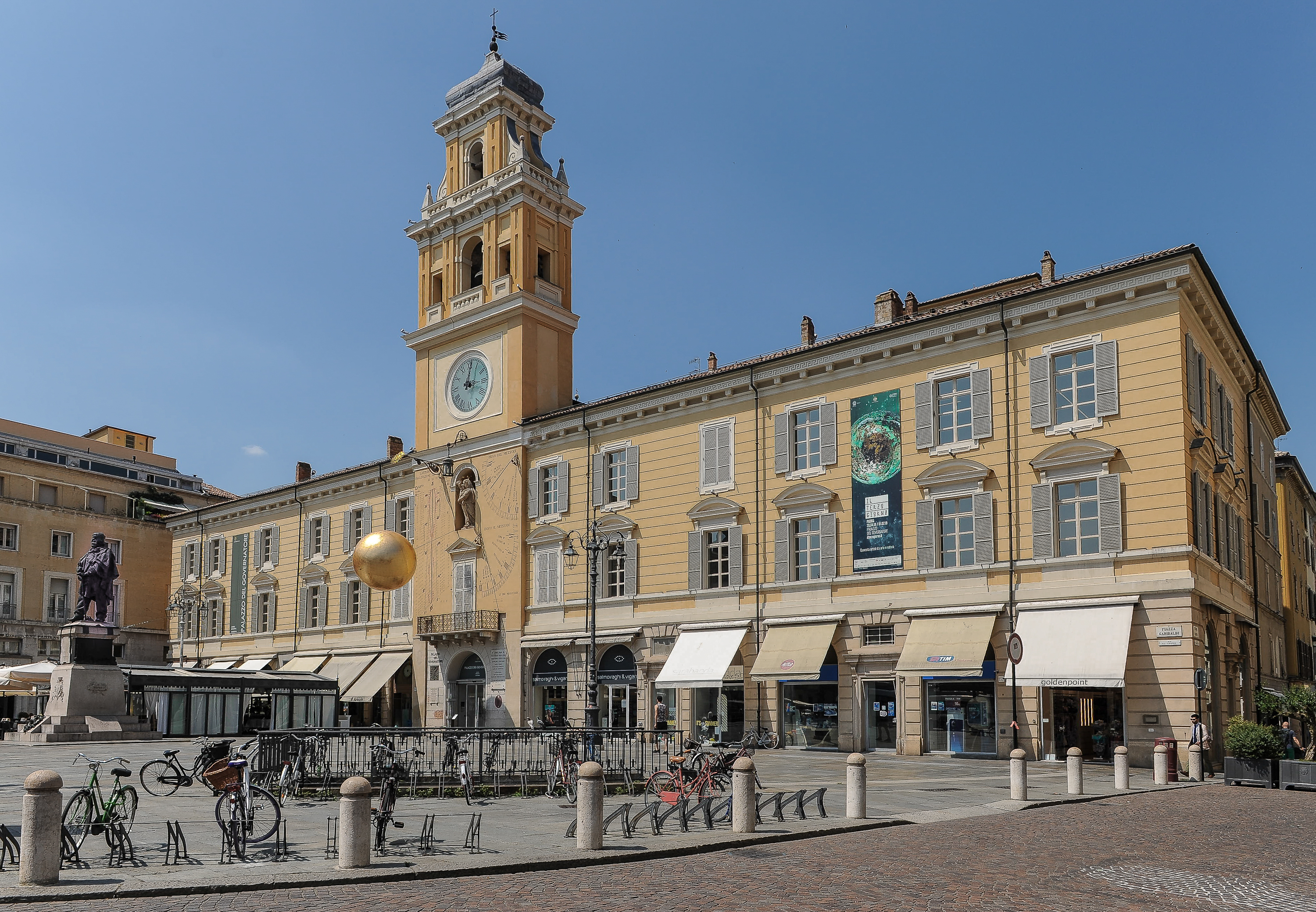 Palazzo del Governatore, Parma, Italy